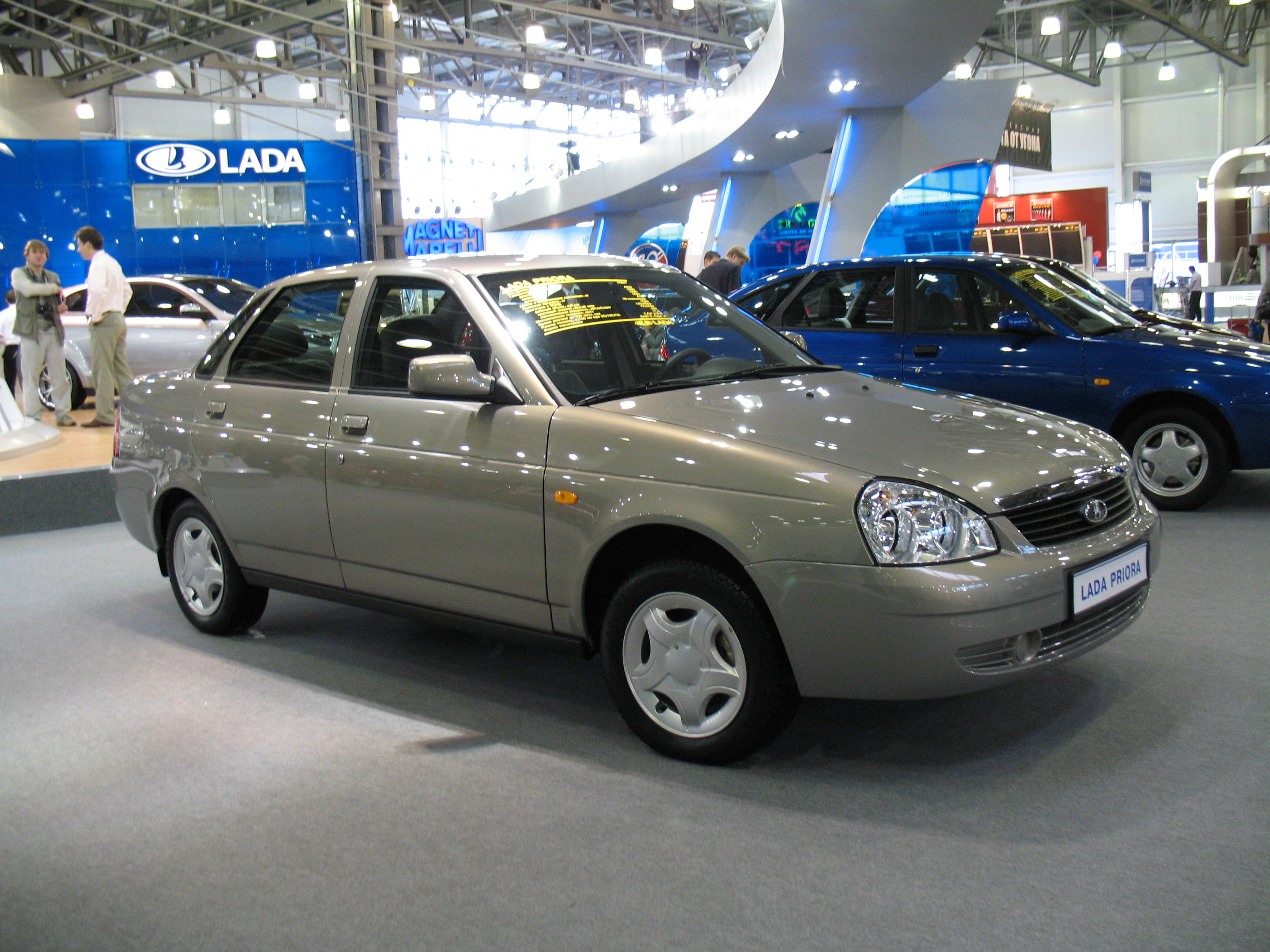 LADA Priora 2170